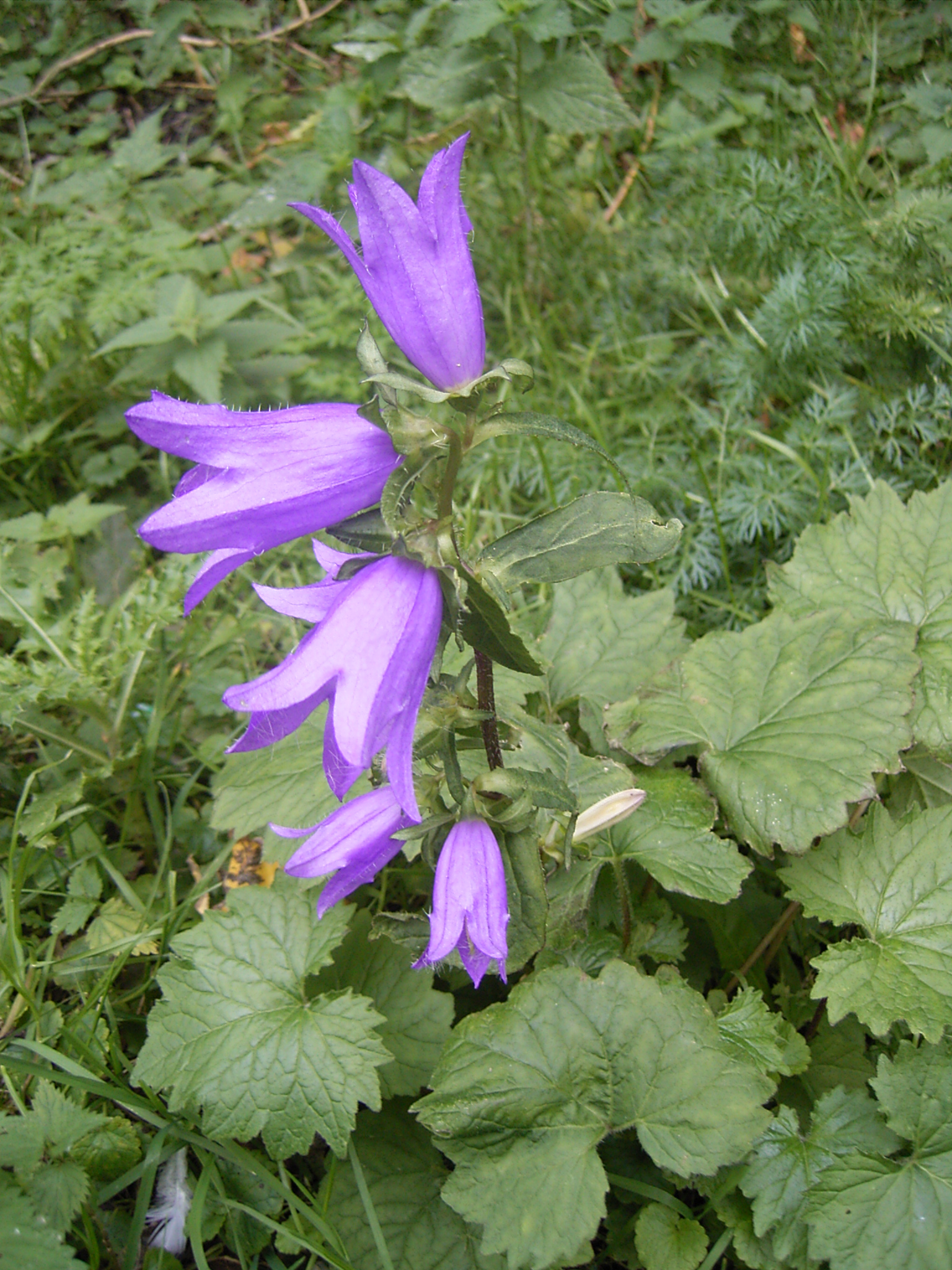 Deze foto toont het Ruig klokje. Ik nam de foto in onze tuin, waar hij ooit is komen aanwaaien. This pic shows Campanula trachelium. I took the pic in our garden, where the wind had brought the seeds.